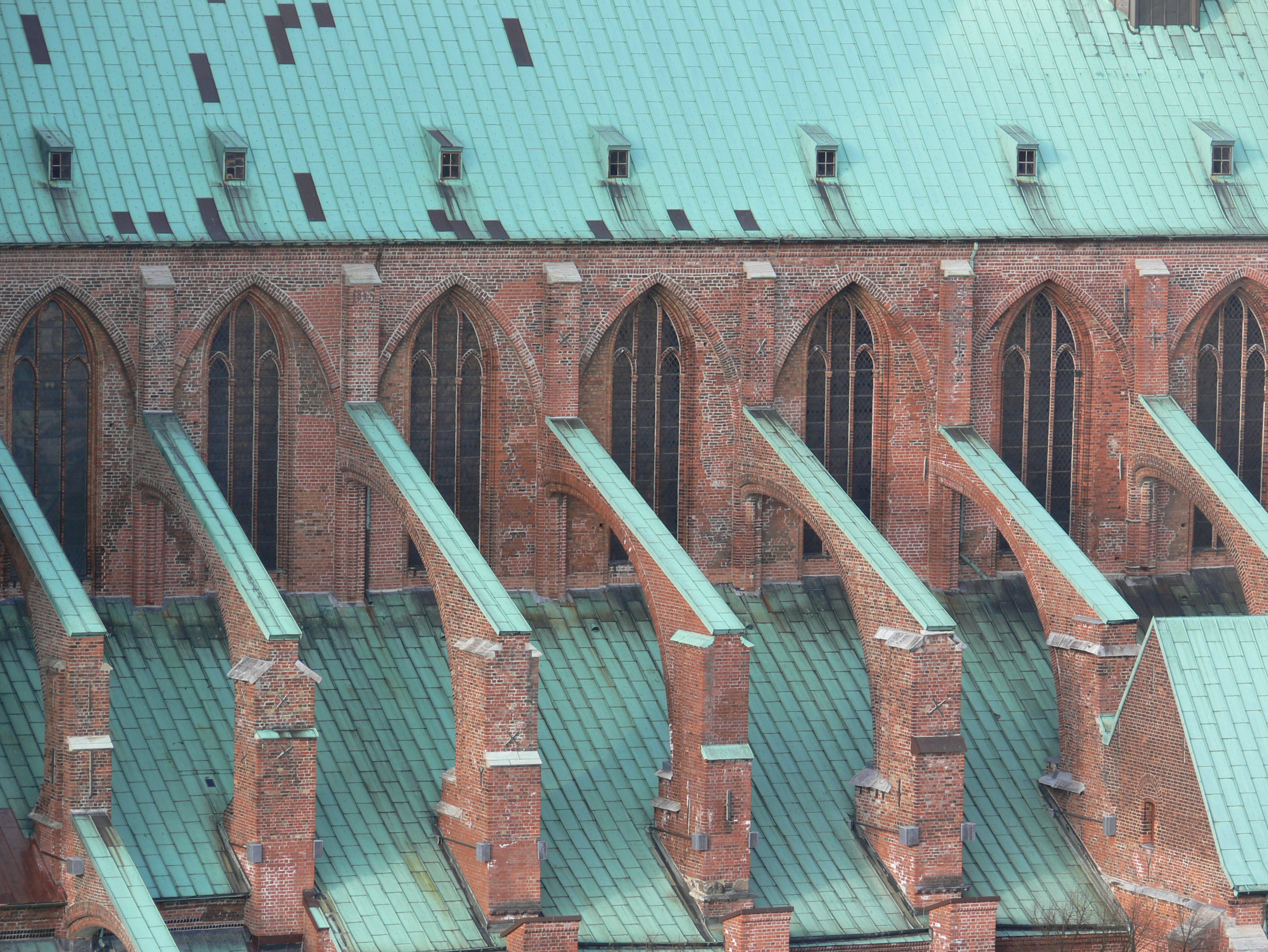 Strebewerk (Strebebögen und Strebepfeiler) der Kirche St.Marien zu Lübeck. Dahinter Obergaden (Clerestory).